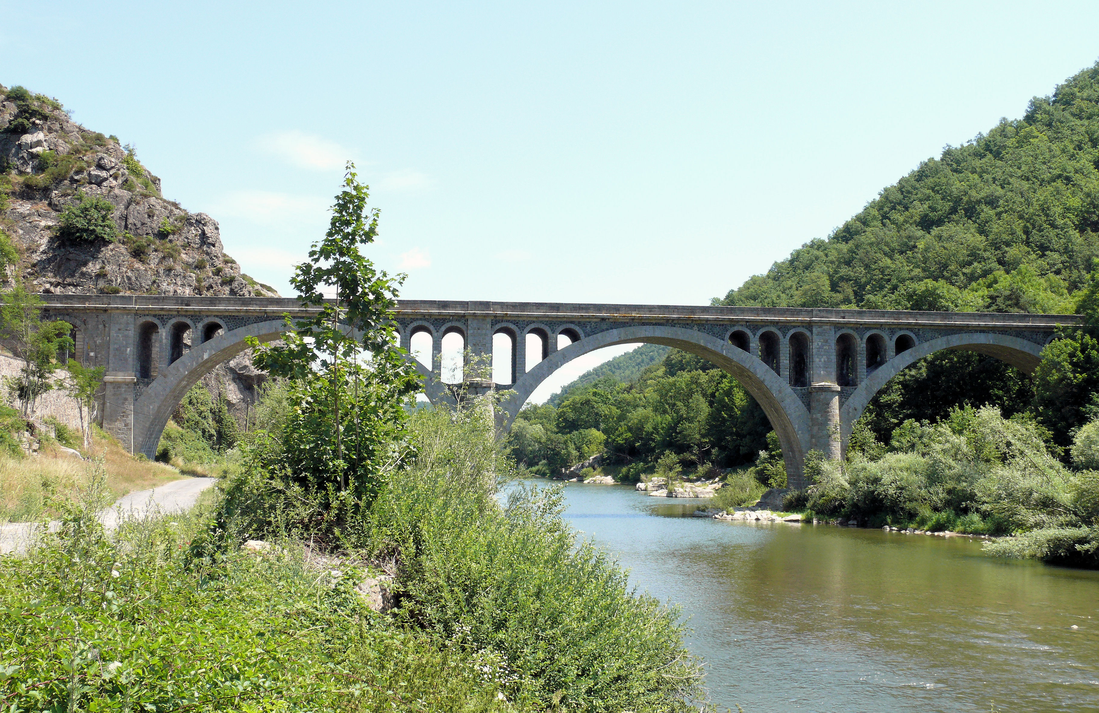 Vorey - Pont sur la Loire au hameau du Chambon